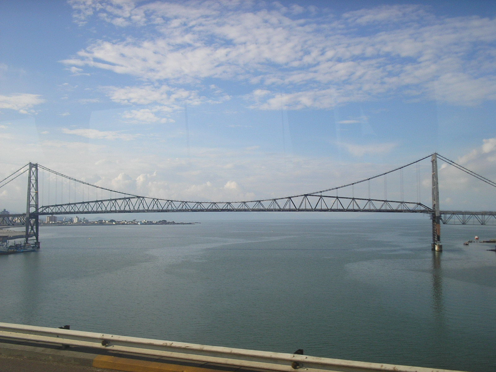 Ponte hercilio Luz, Florianópolis, vista da ponte Colombo Sales